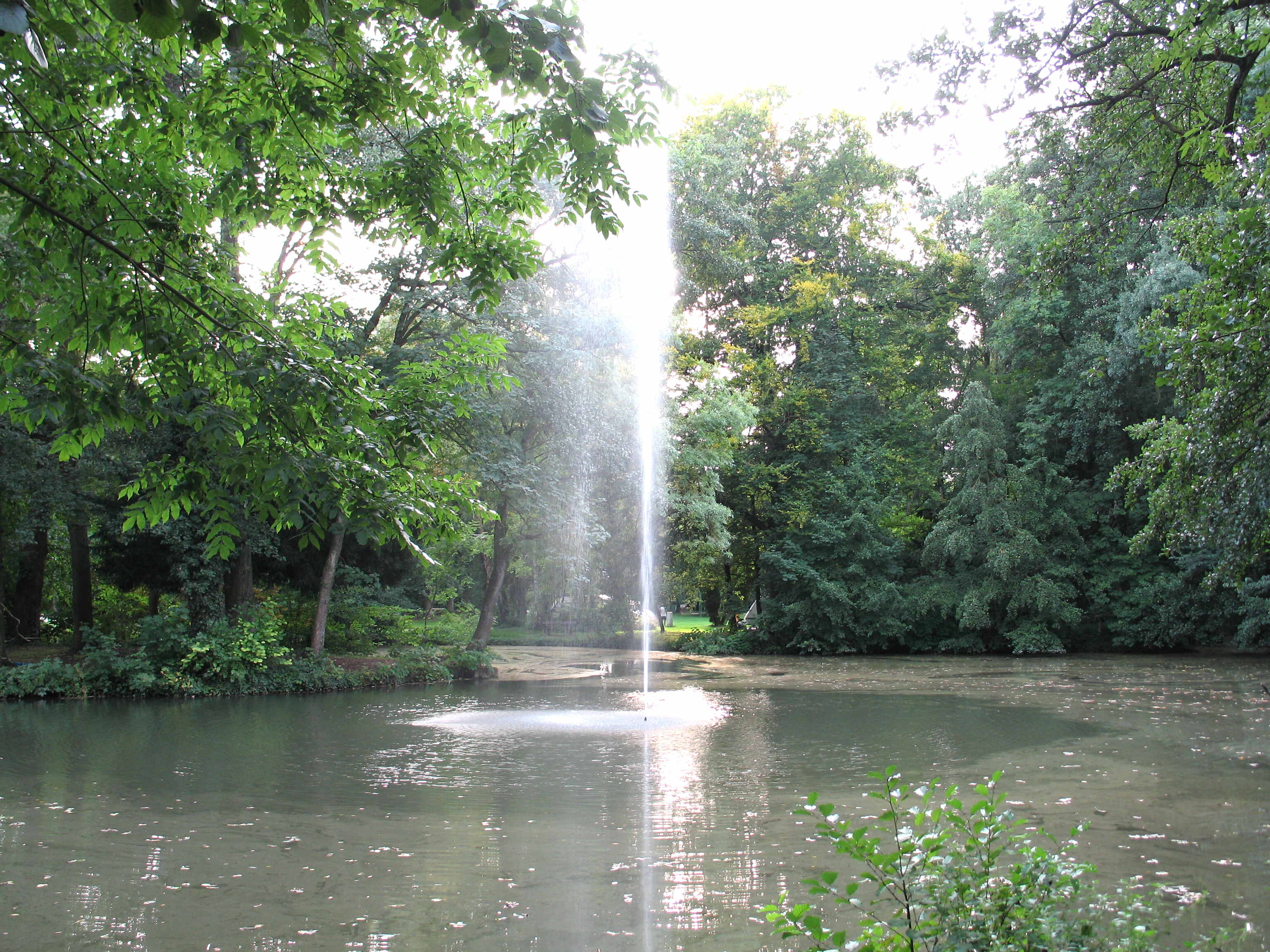 Am Park vu Mäertert. Kategorie:Gemeng Mäertert